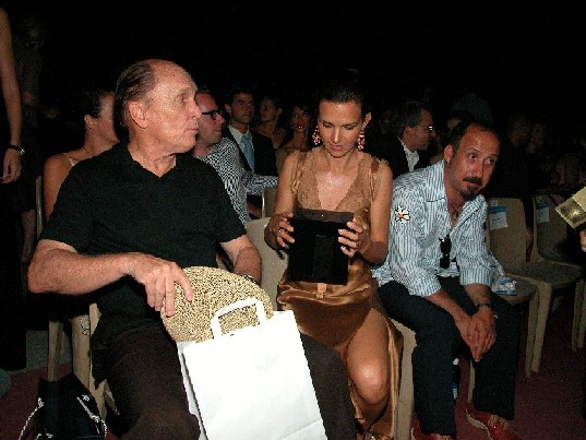 Robert Duval, Kathy Baker e Franco Zanghì al Festival del cinema di Taormina.